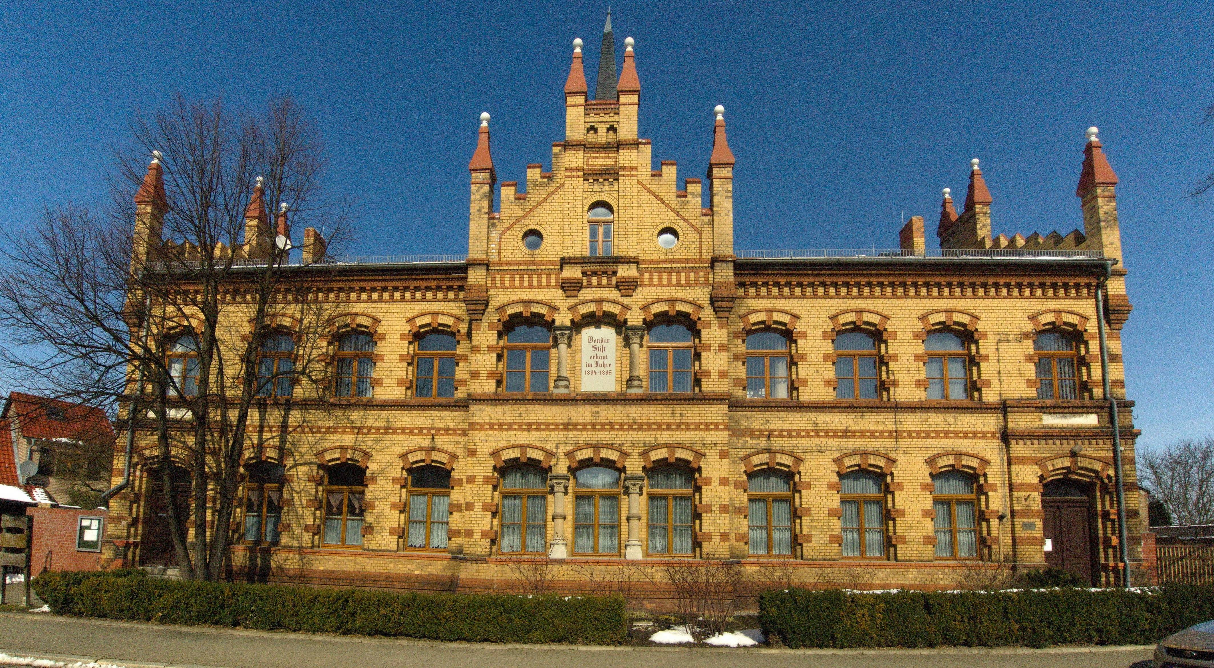 Rathaus Frose, ehemaliger Bendix-Stift